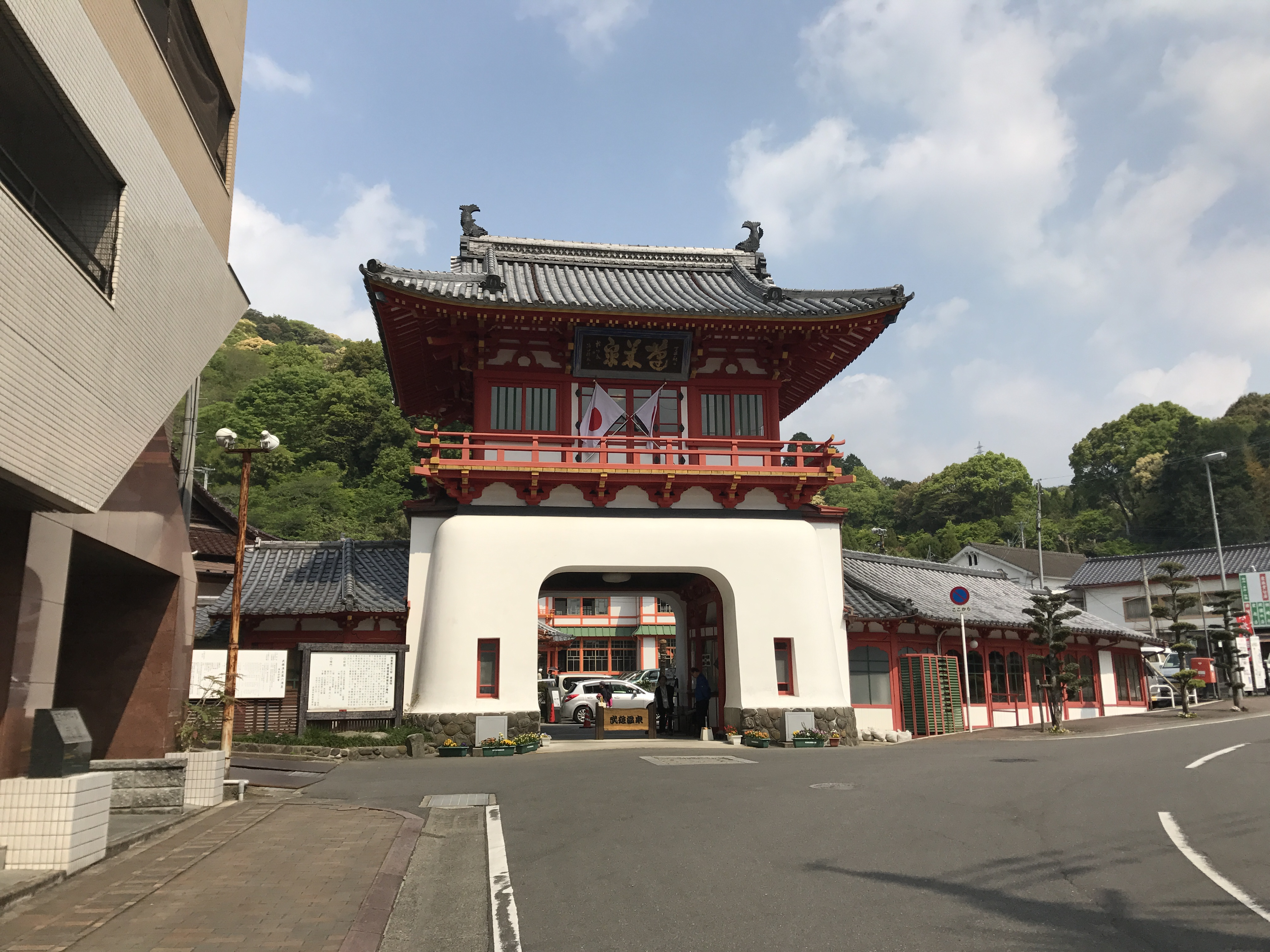 武雄温泉楼門